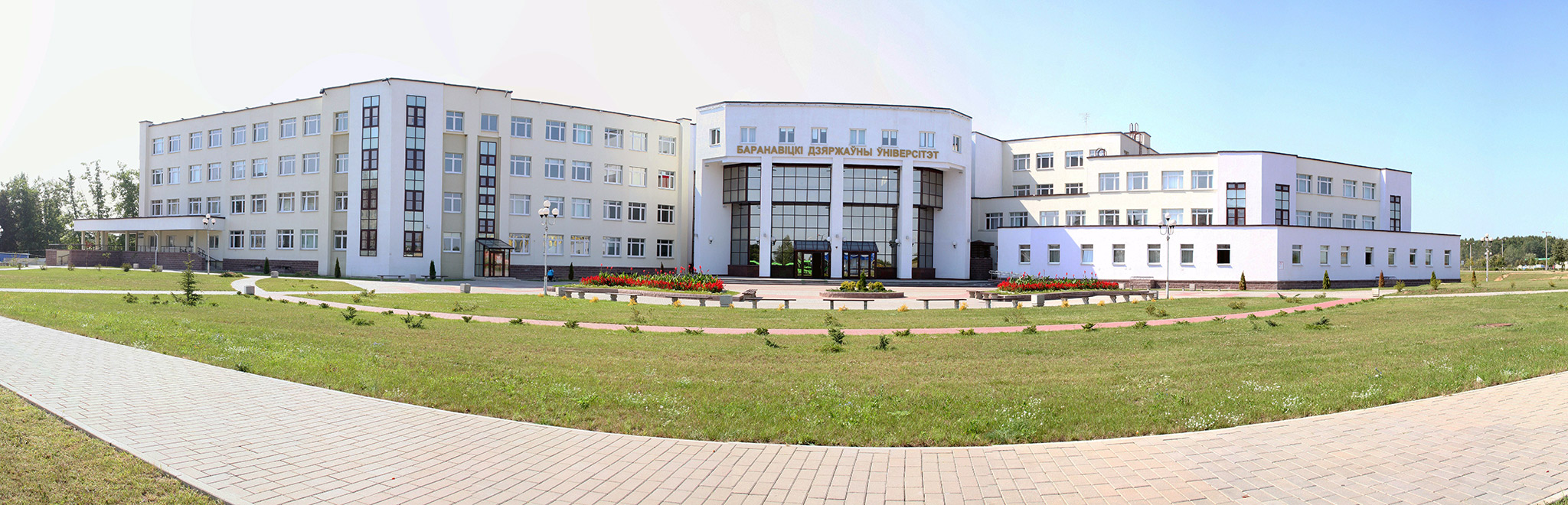 Учреждение образования "Барановичский государственный университет"